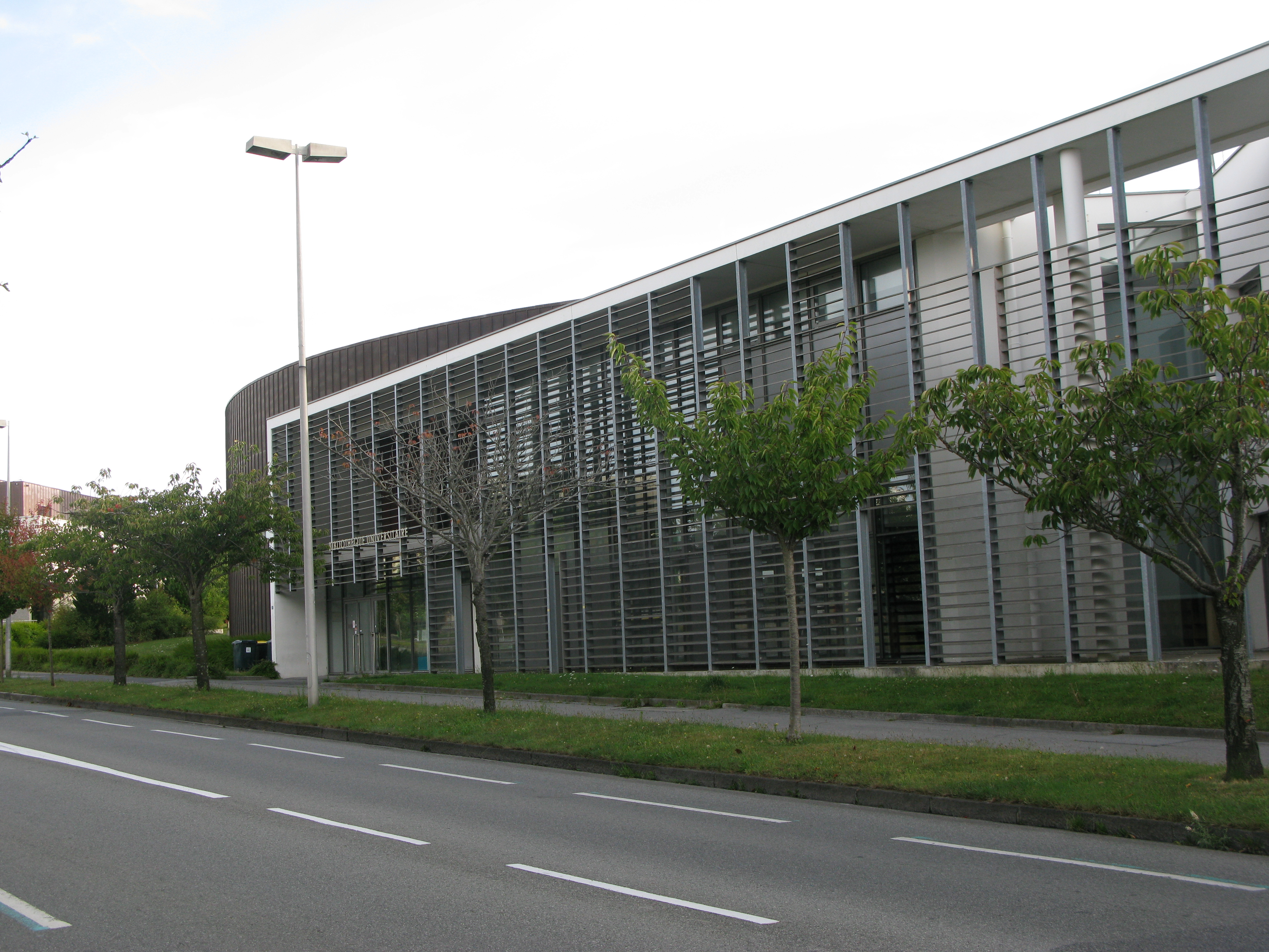 Bibliothèque Universitaire de l'Université de Bretagne Sud à Lorient.